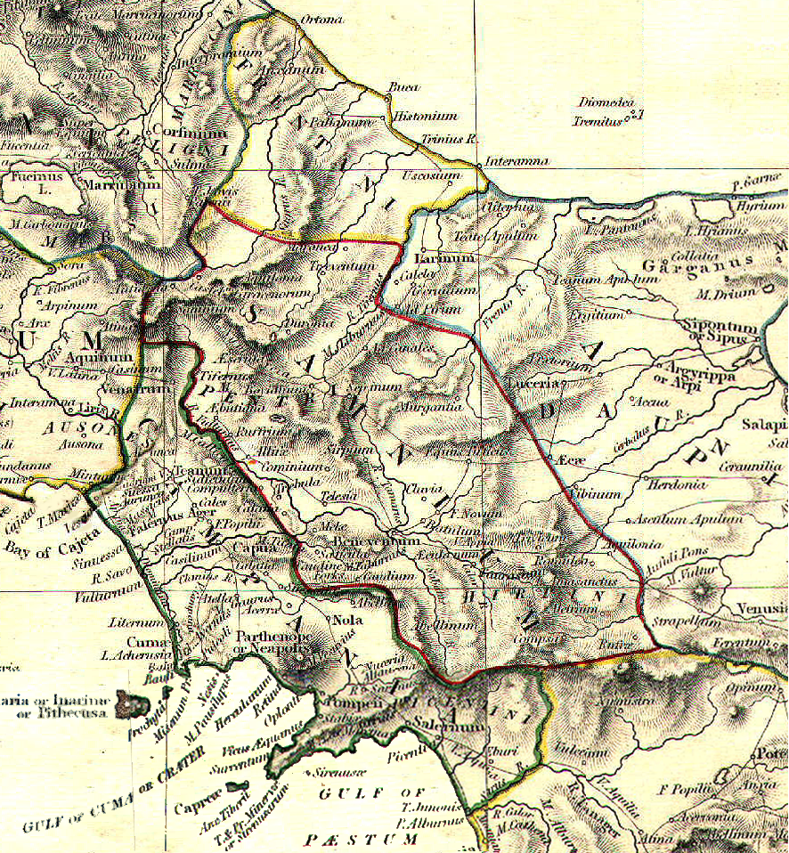 Reference map for Samnium